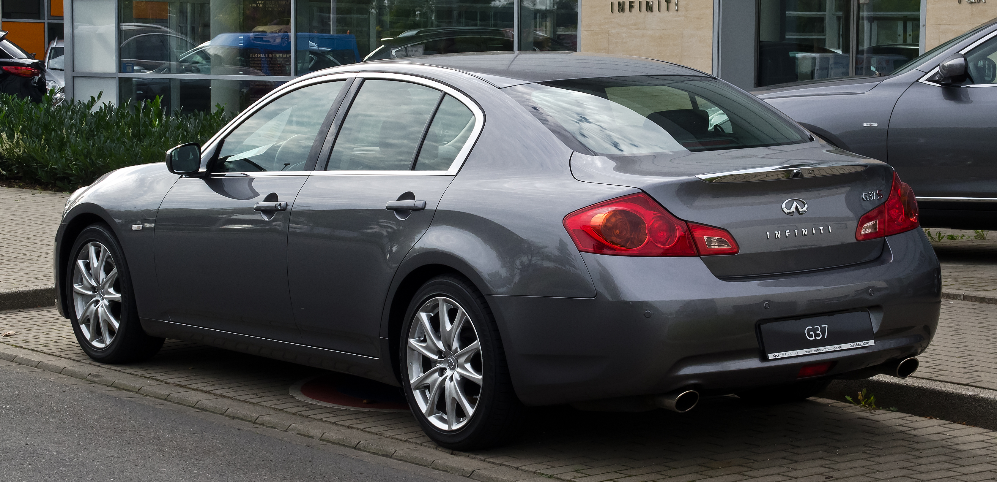 Infiniti G37 S (V36, Facelift)